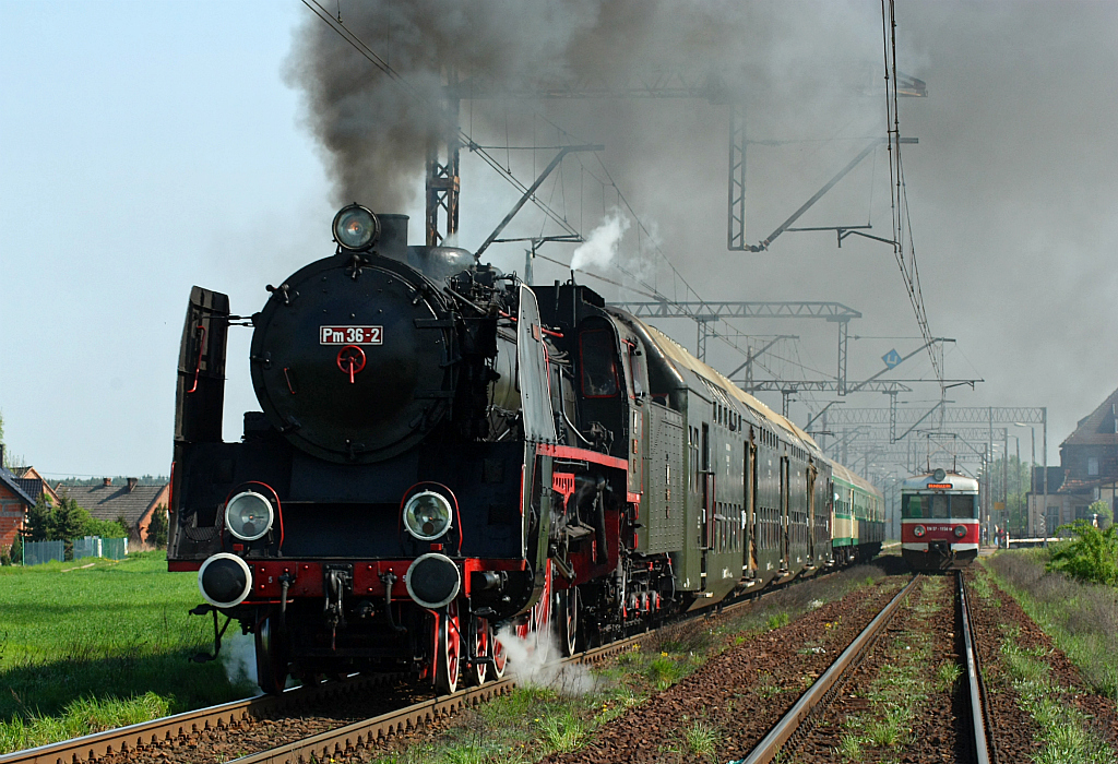 Iłowiec (Pecna). Pm36-2 + IR 77500 relacji Poznań Gł. - Wolsztyn 30.04.11.